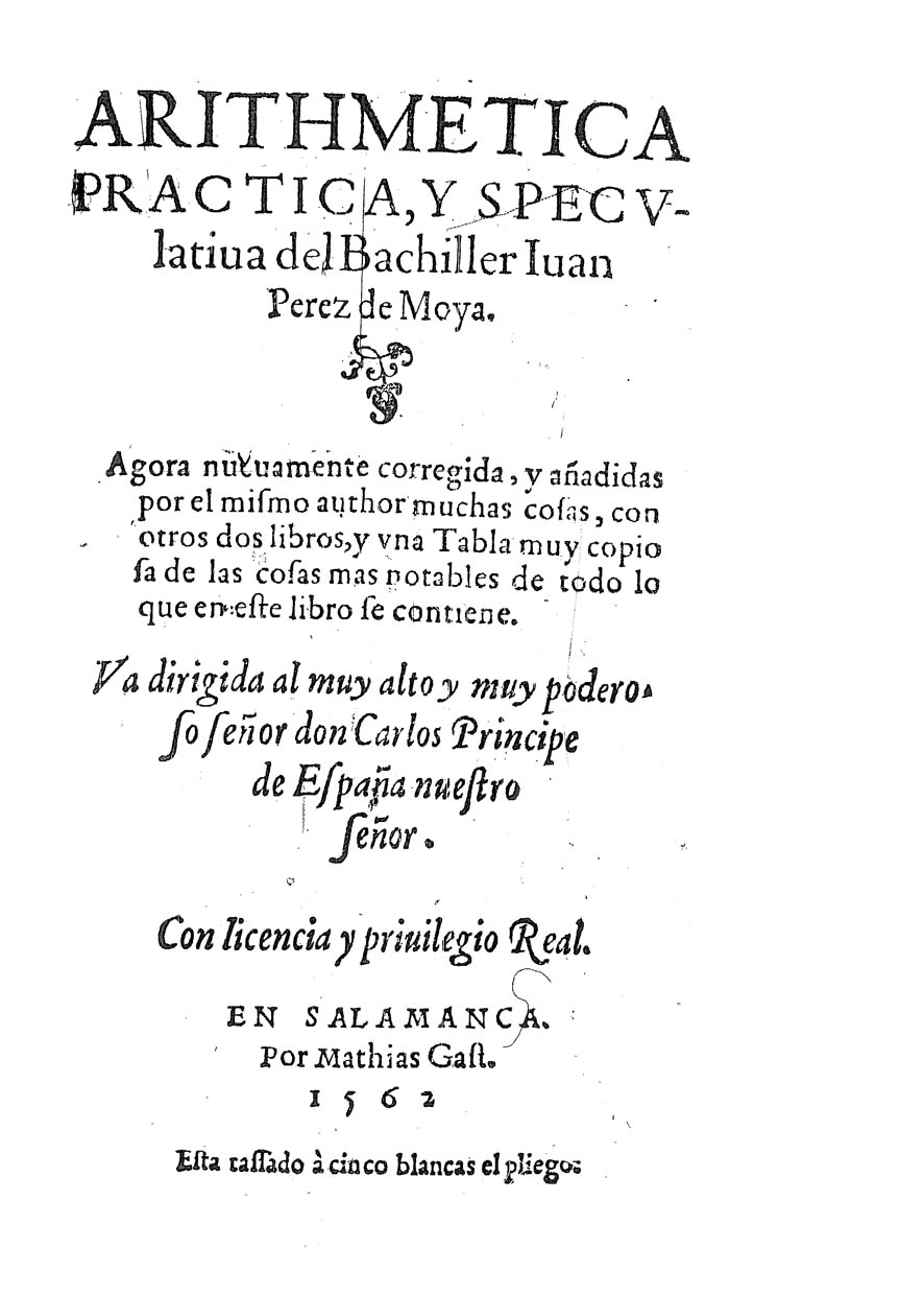 Frontespizio